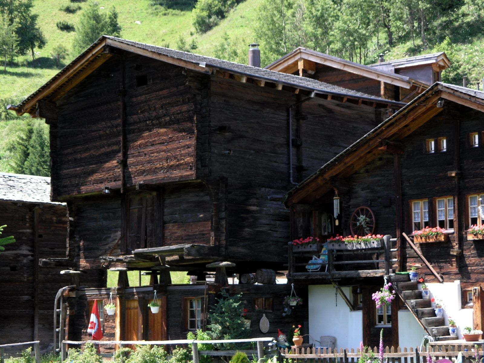 Gommer-Häuser aus Lärchenholz mit Mäuseteller im Ort Münster VS